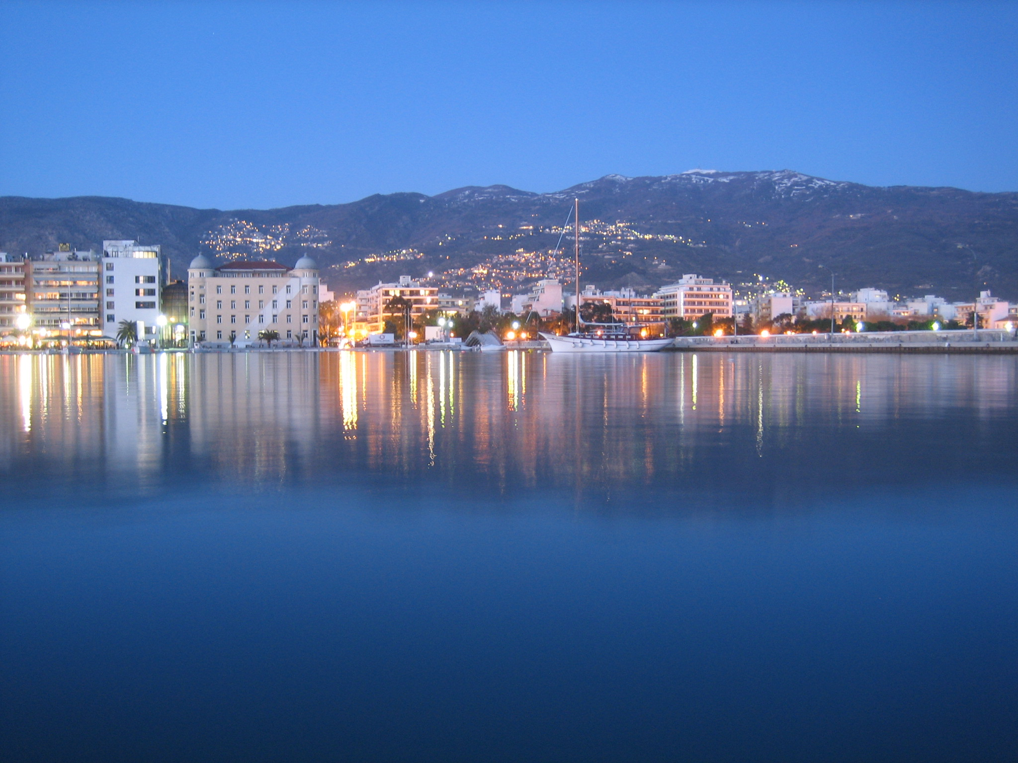 Volos promenade by night